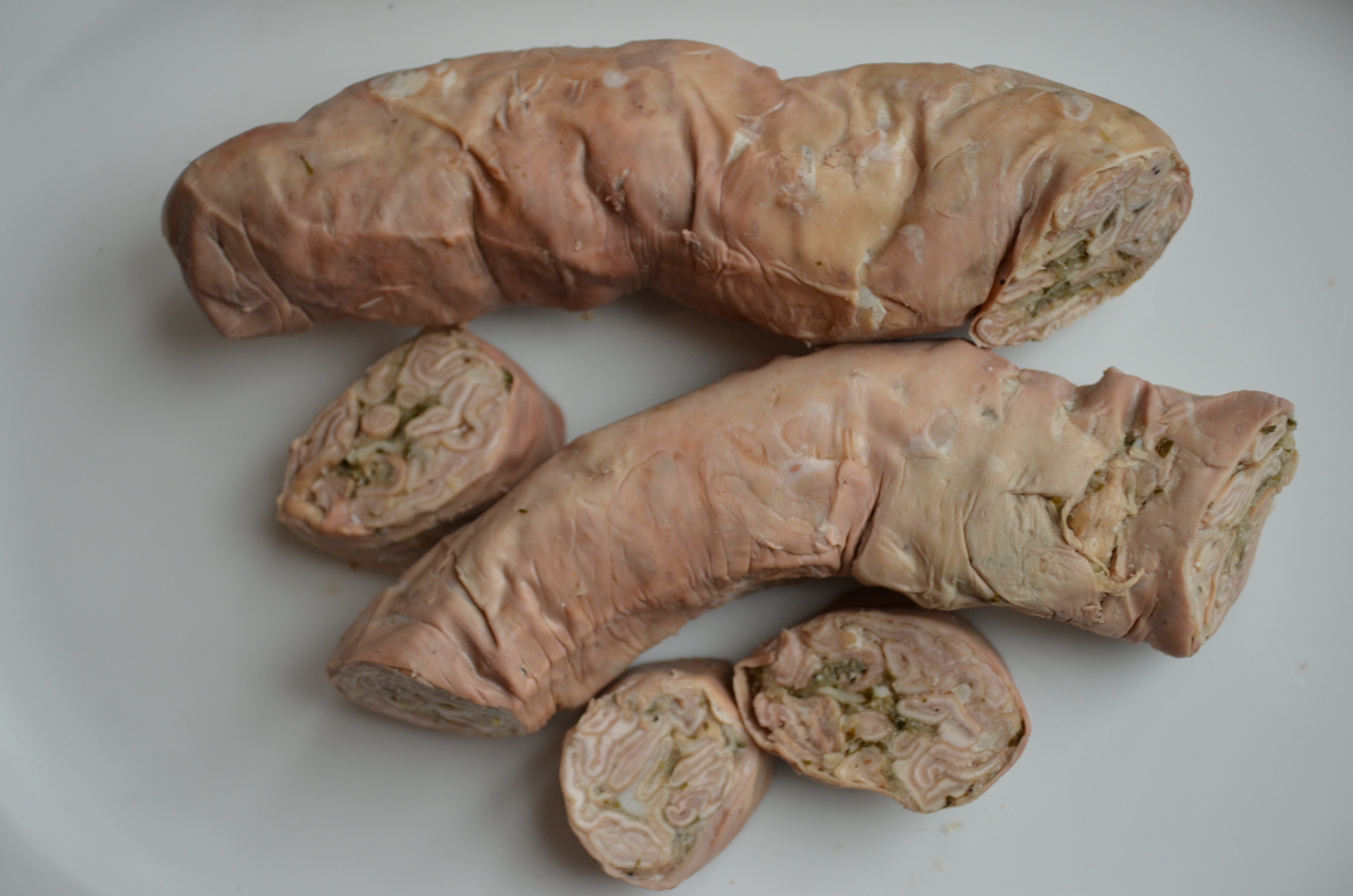 Avant d'être réchauffée et plus ou moins cuisinée, une andouillette élaborée par un artisan charcutier établi à Chablis. De type "Troyes", et parfumée au Chablis lors de la cuisson après "tirage à la ficelle".